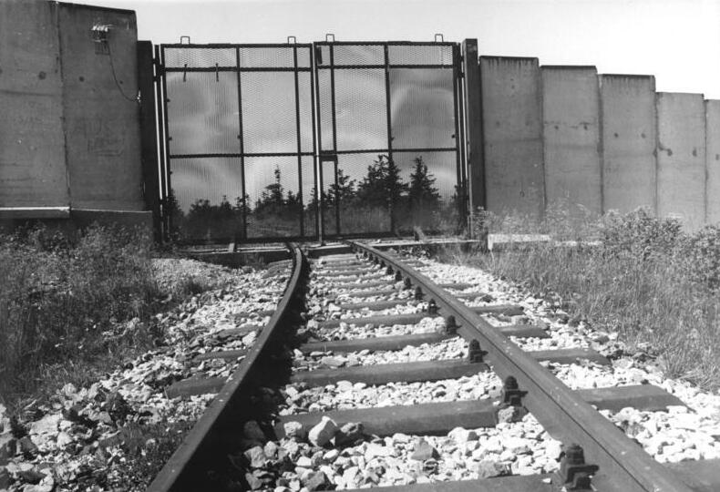 ADN-Thomas Uhlemann/ 10.9.90-Bez. Magdeburg: Brockenbahn- Am 12.8.1961 fuhr der letzte Zug der 1000 mm Schmalspurbahn die insgesamt 19 km lange Strecke von Drei Annen Hohne über Schierke hinauf zum Brocken. Danach konnten Harzreisende nur noch bis Schierke fahren, die restliche Strecke wurde zum Grenzgebiet, die Gleise wurden gesperrt. Nachdem der Brocken wieder besucht werden kann, ist auch die Frage nach der vollständigen Streckenführung der Brockenbahn wieder aktuell. Allerdings sind die noch stillgelegten 13,6 km zwischen Goetheweg und Gipfel - die hier durch unberührte Natur führen - so defekt, das sie erst einer gründlichen Rekonstruierung bedürfen. Die Diskussion zwischen Naturschützern und Eisenbahnfreunden hält an. Immerhin besuchen an manchen Tagen bis zu 25000 Besucher den Brocken.